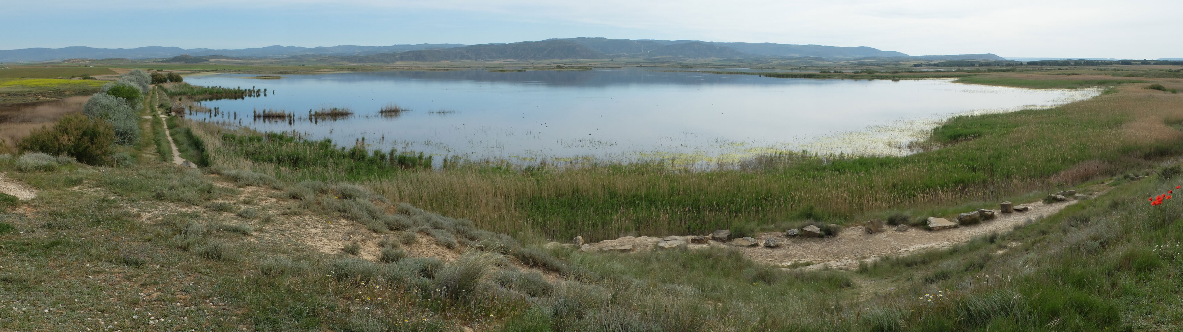 Laguna de Pitillas This is a photography of a Site of Community Importance in Spain with the ID: ES0000133. Natura2000 entry, EEA entry